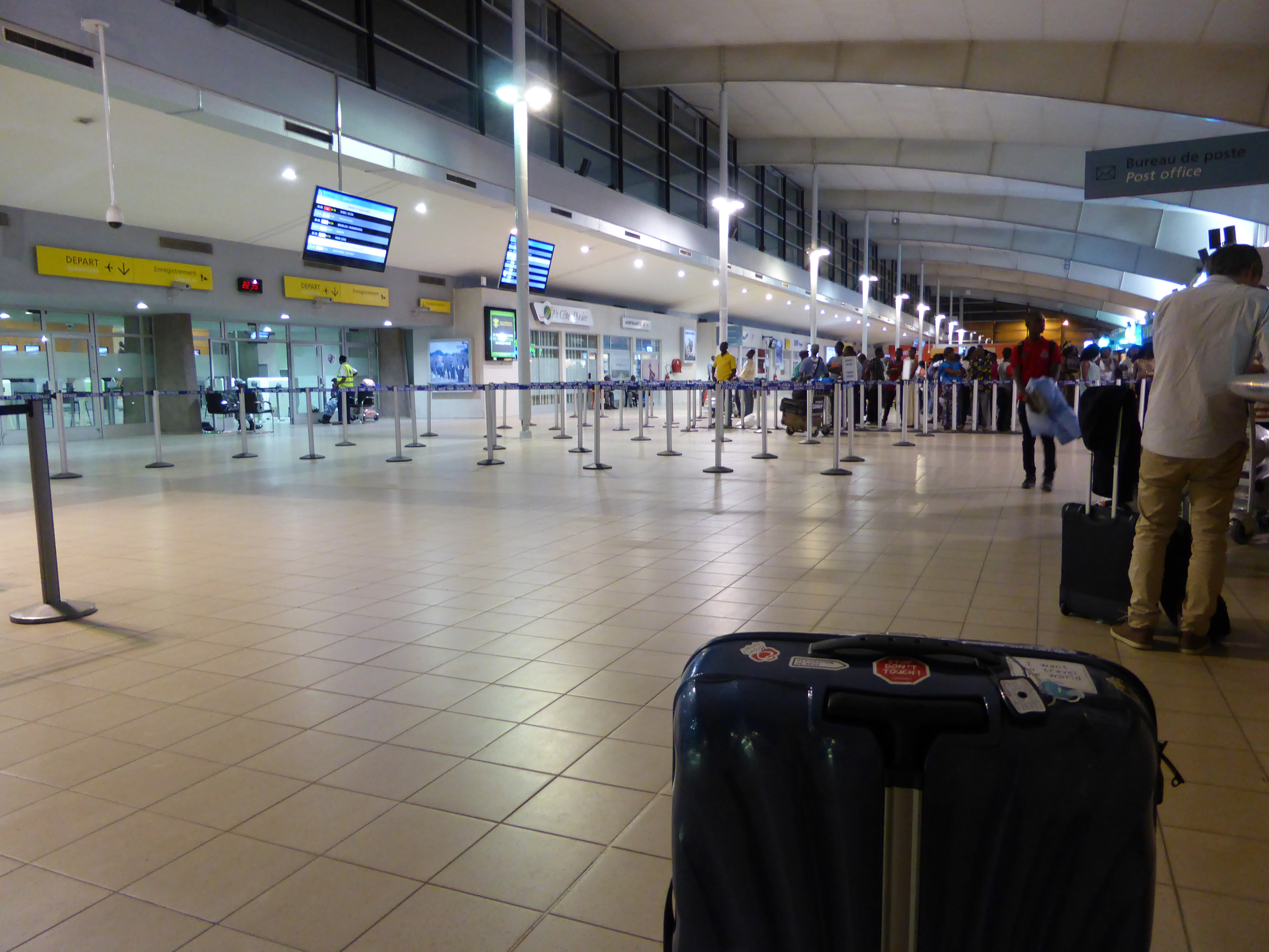 Hall d'embarquement de l'Aéroport International Félix Houphouët-Boigny à Abidjan